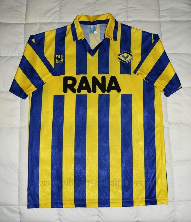 Maglia dell'Hellas Verona della stagione 1992-1993